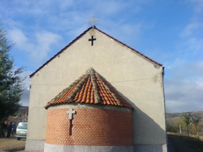 Стара црква св. Ѓорѓи - Сирково